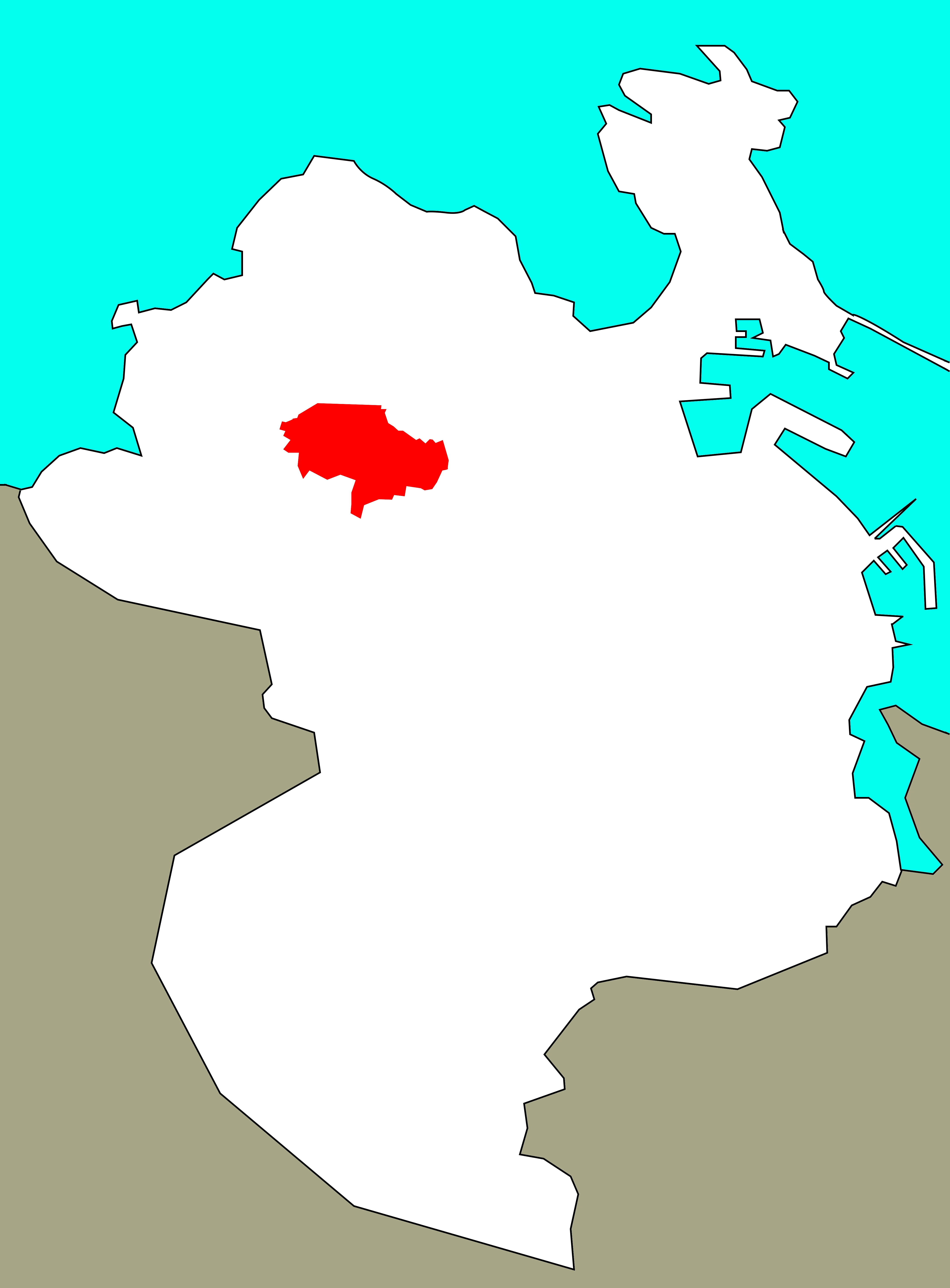 Situación de Penamoa no concello da Coruña.[1]